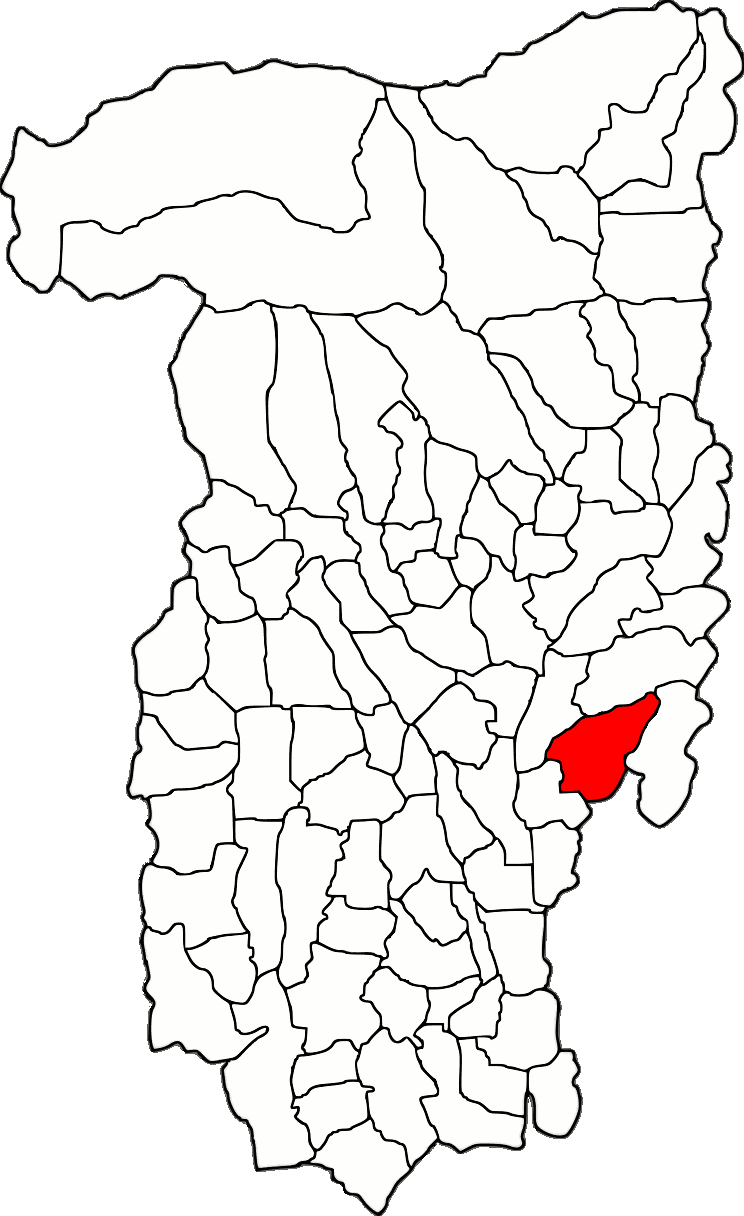 Lage der Gemeinde Stoilești im Kreis Vâlcea (RO).